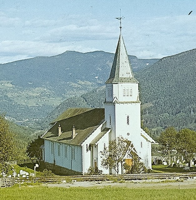 Gol kirke